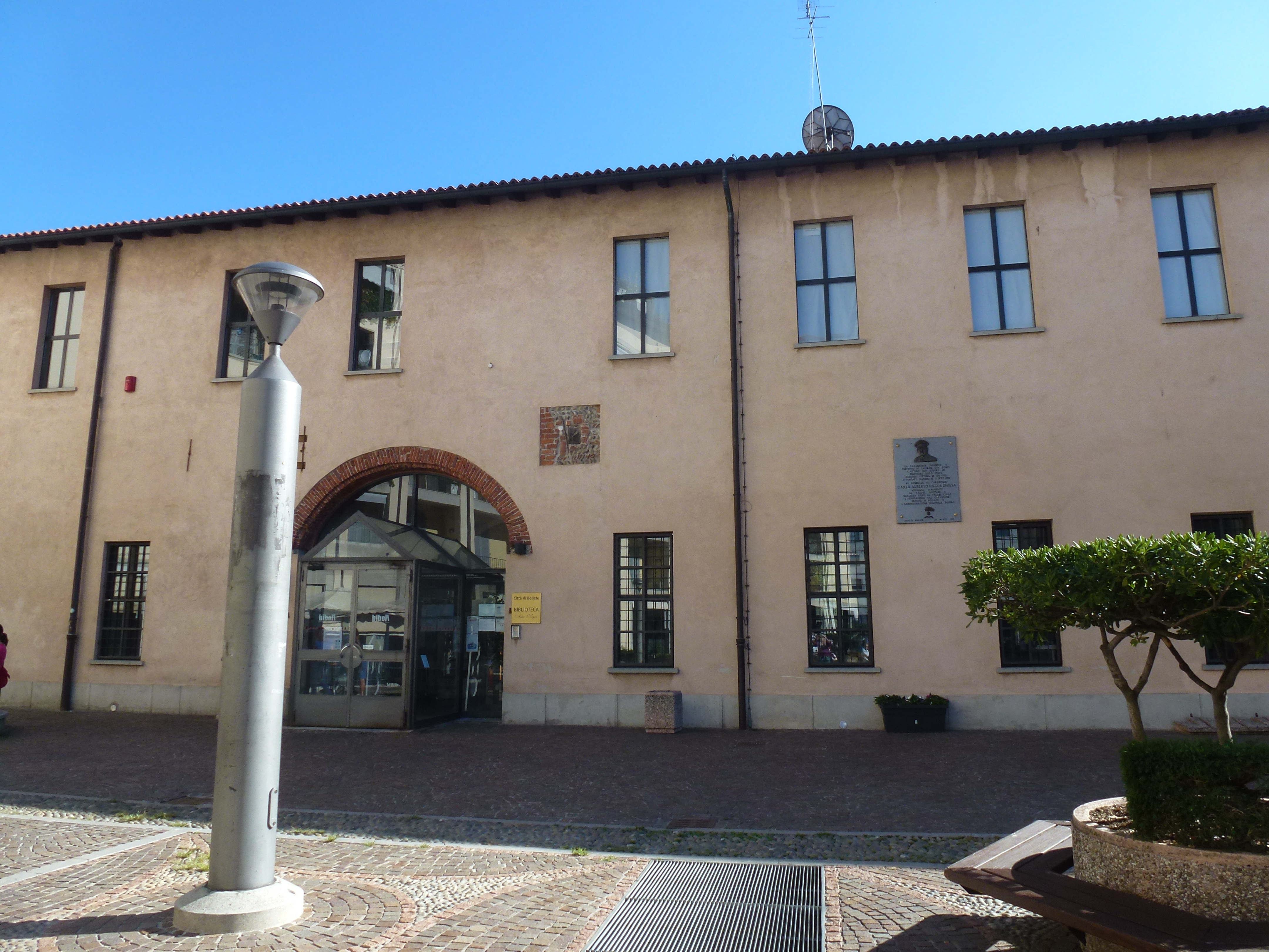 Palazzo Seccoborella - Biblioteca Comunale facciata This is a photo of a monument which is part of cultural heritage of Italy.